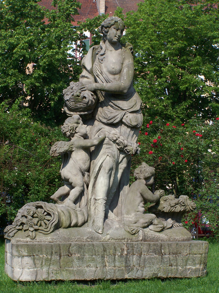 Posąg Flory w Szczecinie